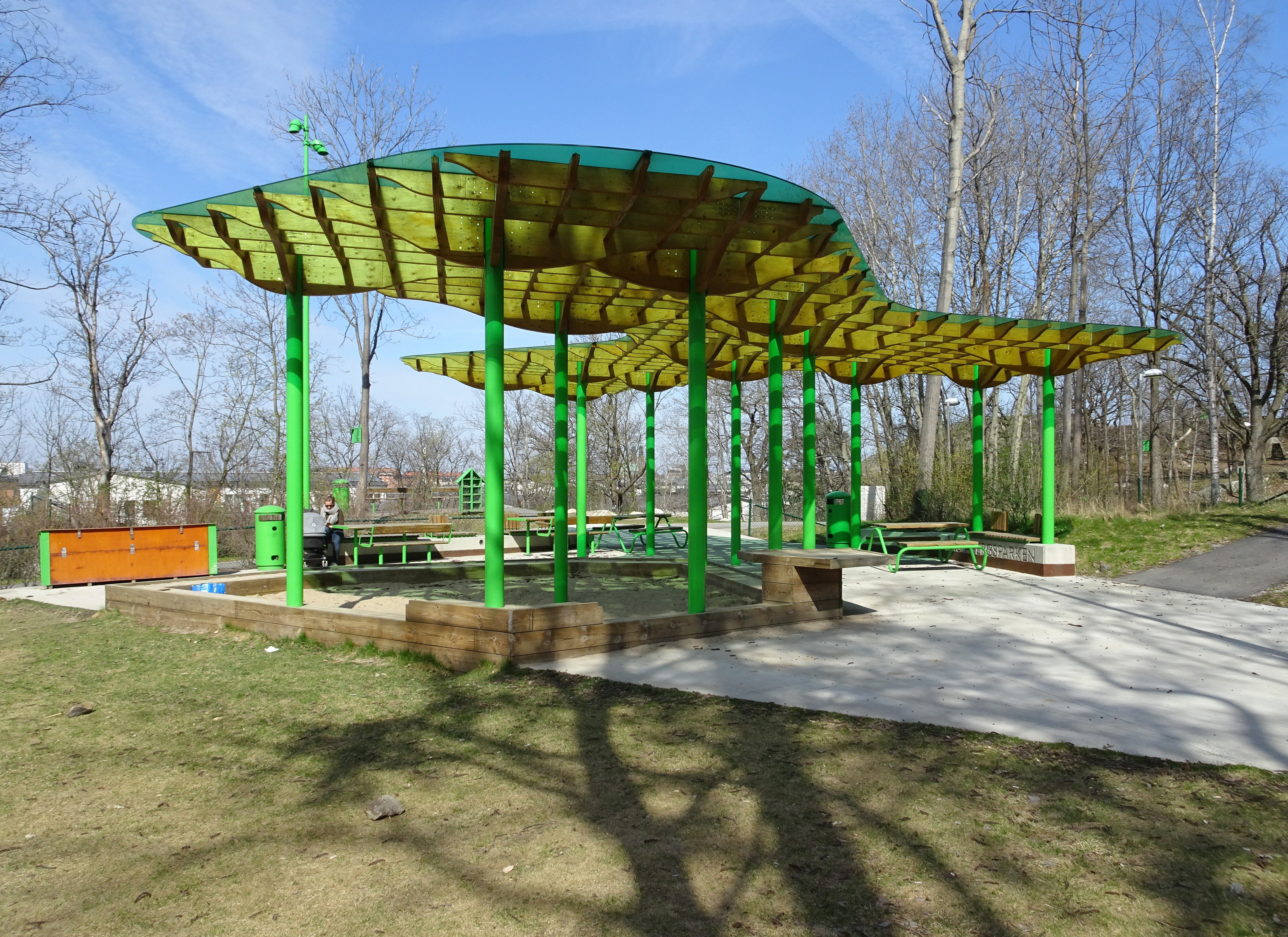 Årstabergsparken. Stadsdel: Årsta/Liljeholmen Byggherre: Stockholms stad Arkitekt: Nyréns Arkitektkontor